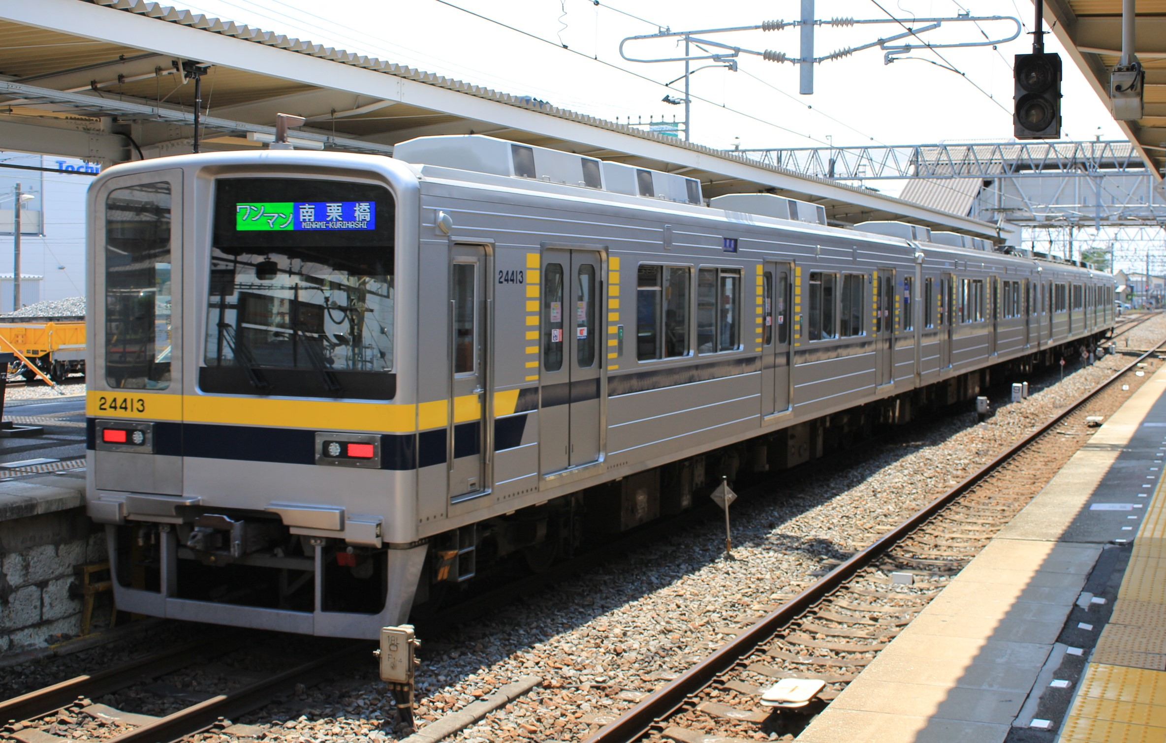 東武20410系電車